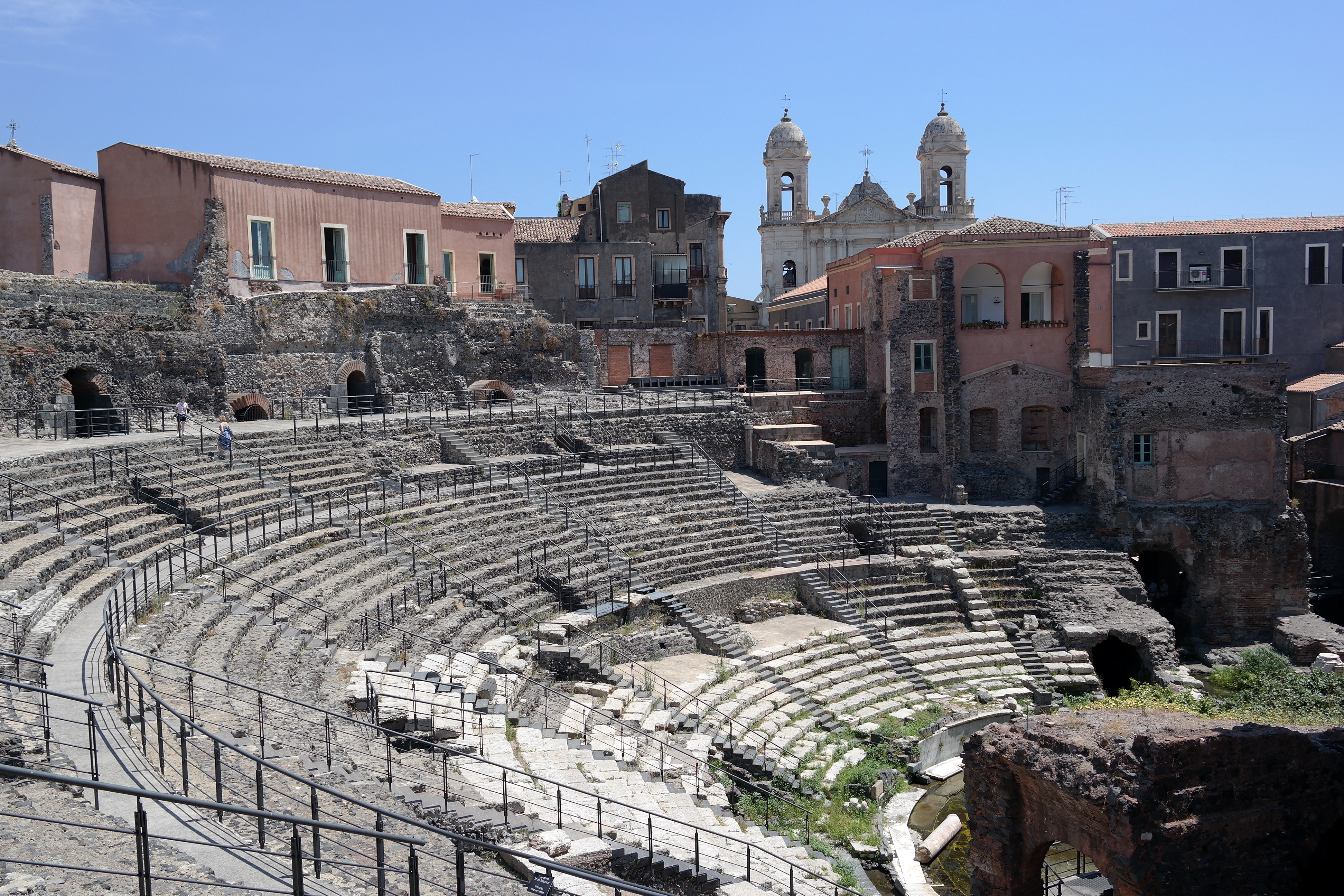 Cavea del Teatro Romano di Catania. Sullo sfondo svettano i campanili della Chiesa di San Francesco d'Assisi all'Immacolata